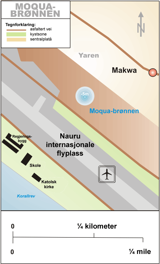 Kart over Moqua-brønnen.